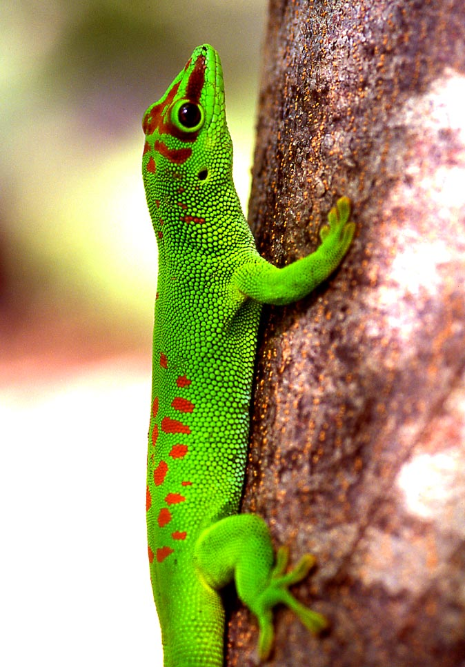 magnifique lézard typique de Madagascar (genre Phelsuma)